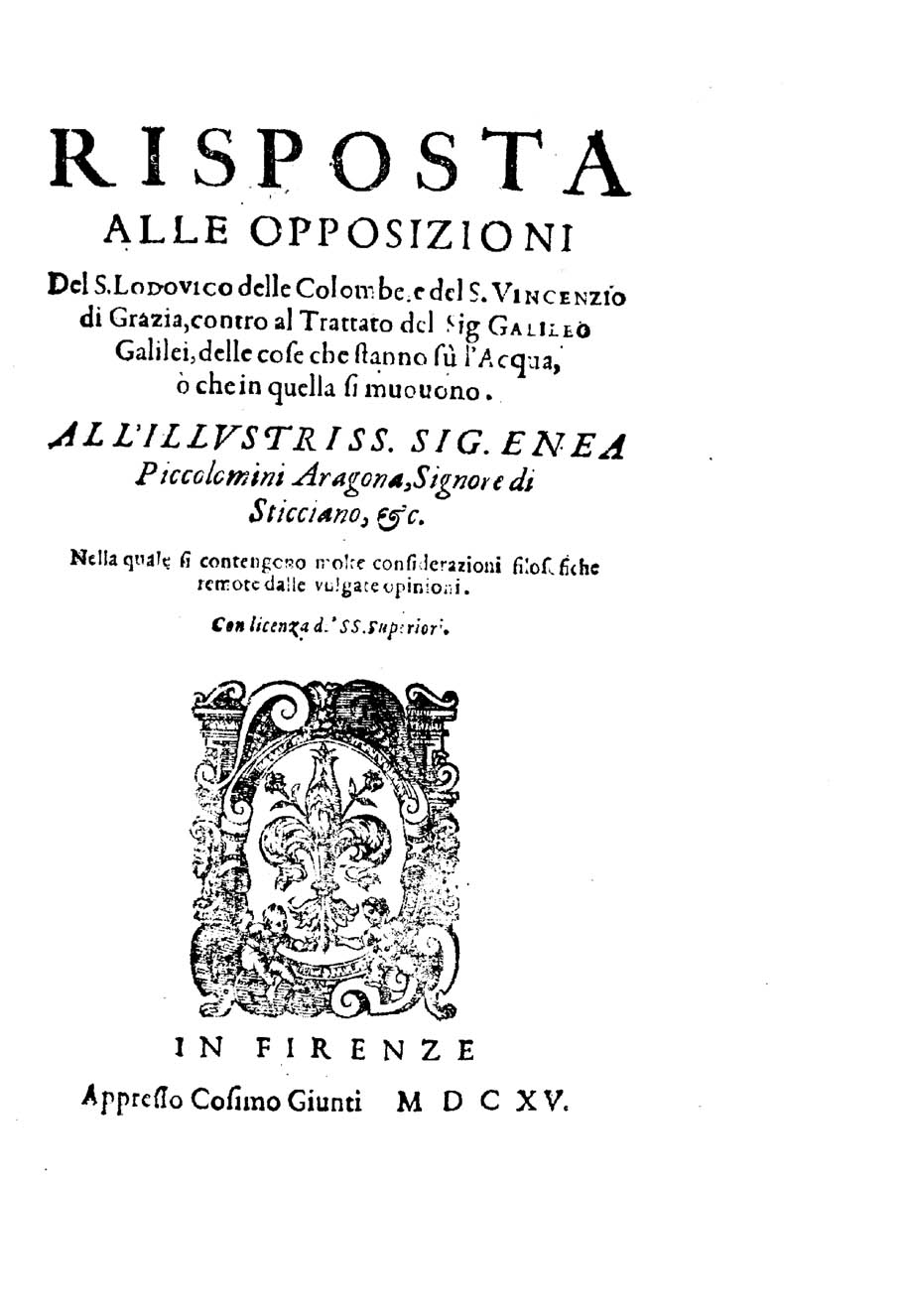 Risposta alle opposizioni del s. Lodouico delle Colombe e del s. Vincenzio di Grazia, contro al trattato del sig. Galileo Galilei, delle cose che stanno su l'acqua, o che in quella si muouono. ... Nella quale si contengono molte considerazioni filosofiche remote dalle vulgate opinioni. - In Firenze : appresso Cosimo Giunti, 1615 (nella stamperia di Cosimo Giunti). - [4], 319 [i.e. 335], [5] p. ; 4º . Frontespizio